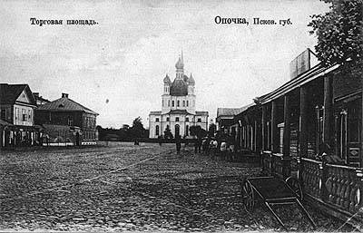 Опочка. Торговая площадь. Дореволюционная открытка